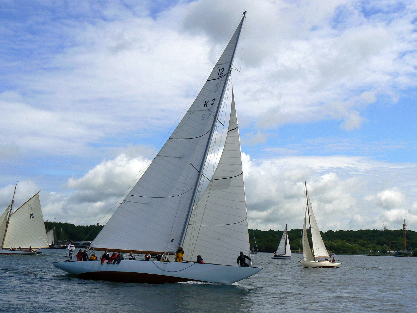 12mR Yacht Evaine (Bj. 1936) bei der Regatta "Rendezvous der Klassiker" in der Kieler Förde mit historischen Yachten bei der Kieler Woche 2009.